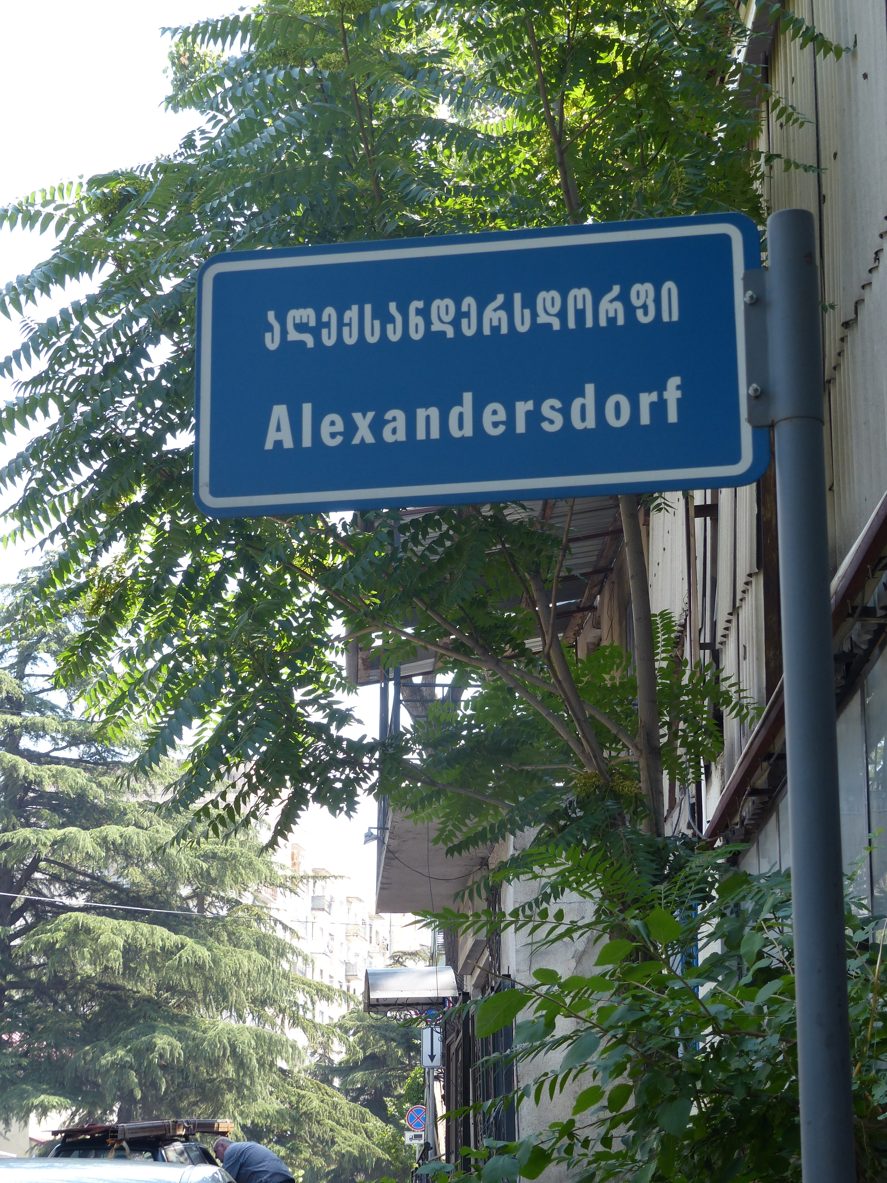 Neu angebrachter Hinweis in Tiflis auf den von Deutschen im 19. Jahrhundert gegründeten Stadtteil Alexandersdorf